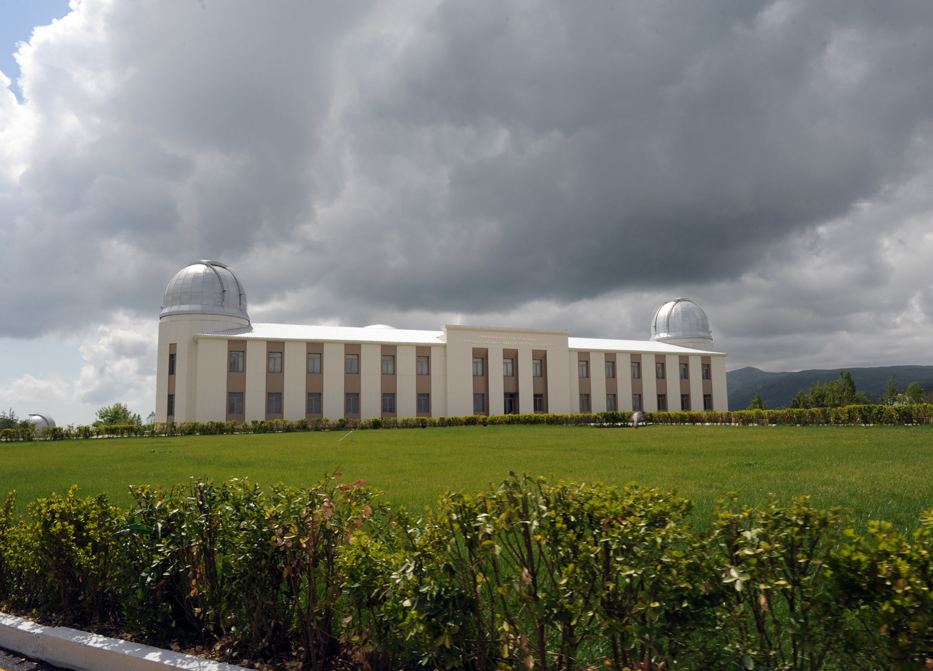 İlham Əliyev Şamaxı Astrofizika Rəsədxanasında əsaslı təmir və yenidənqurmadan sonra yaradılan şəraitlə tanış olarkən